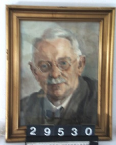 Maleri i forgyldt ramme af Johannes Vogelius.